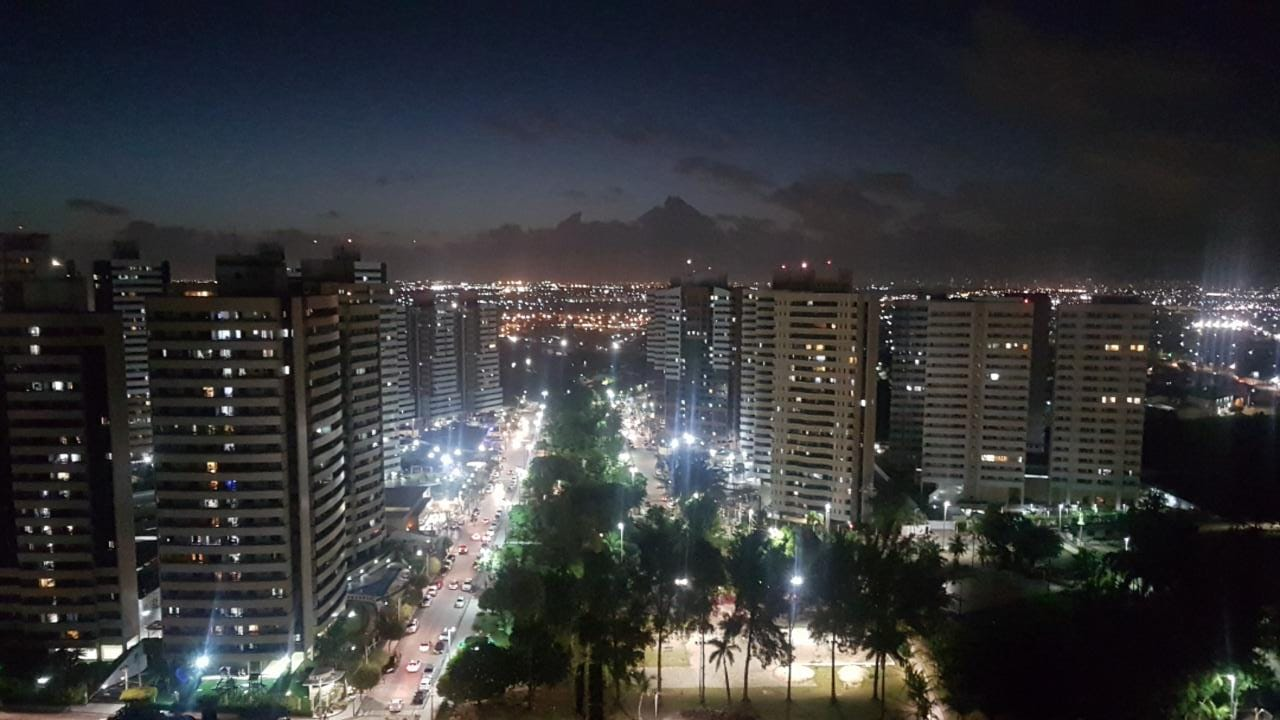 Parque Del Sol